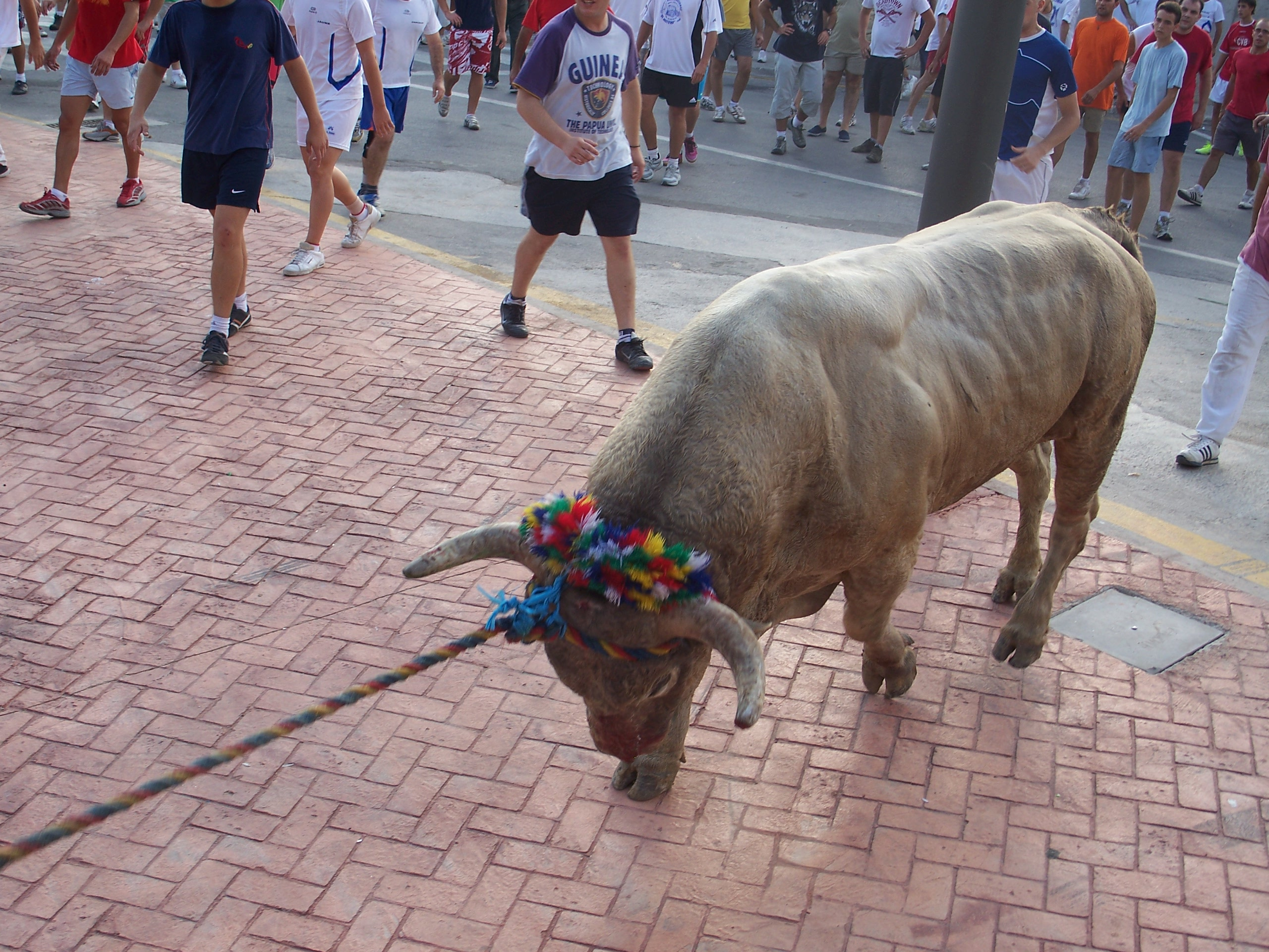 Bou en corda de Torís al 2007